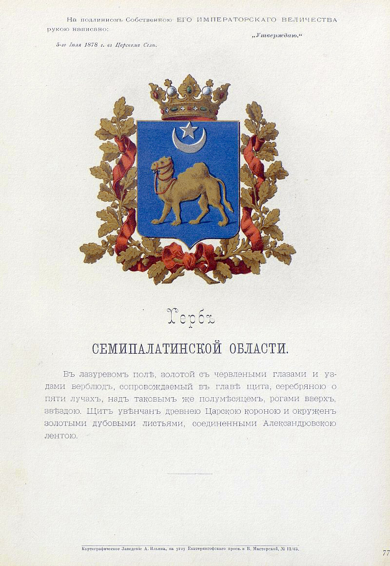 Official Russian Empire coat of arms Semipalatinsk Oblast. Герб Российской Империи Семипалатинской области с официальным описанием в Гербовнике Бенке. Утверждён Императором Всероссийским Александром Вторым в 1878 году.